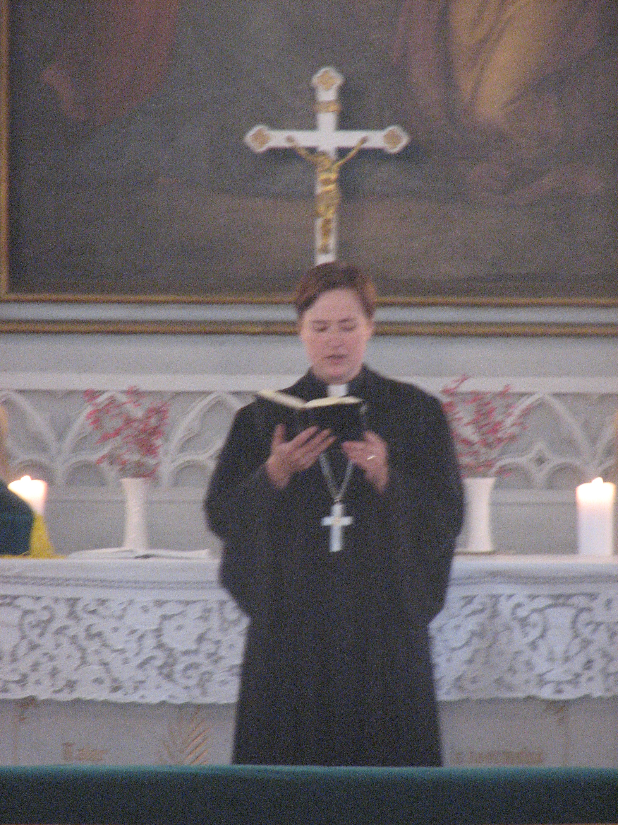 Anna-Liisa Vaher Tarvastu kirikus jumalateenistust pidamas